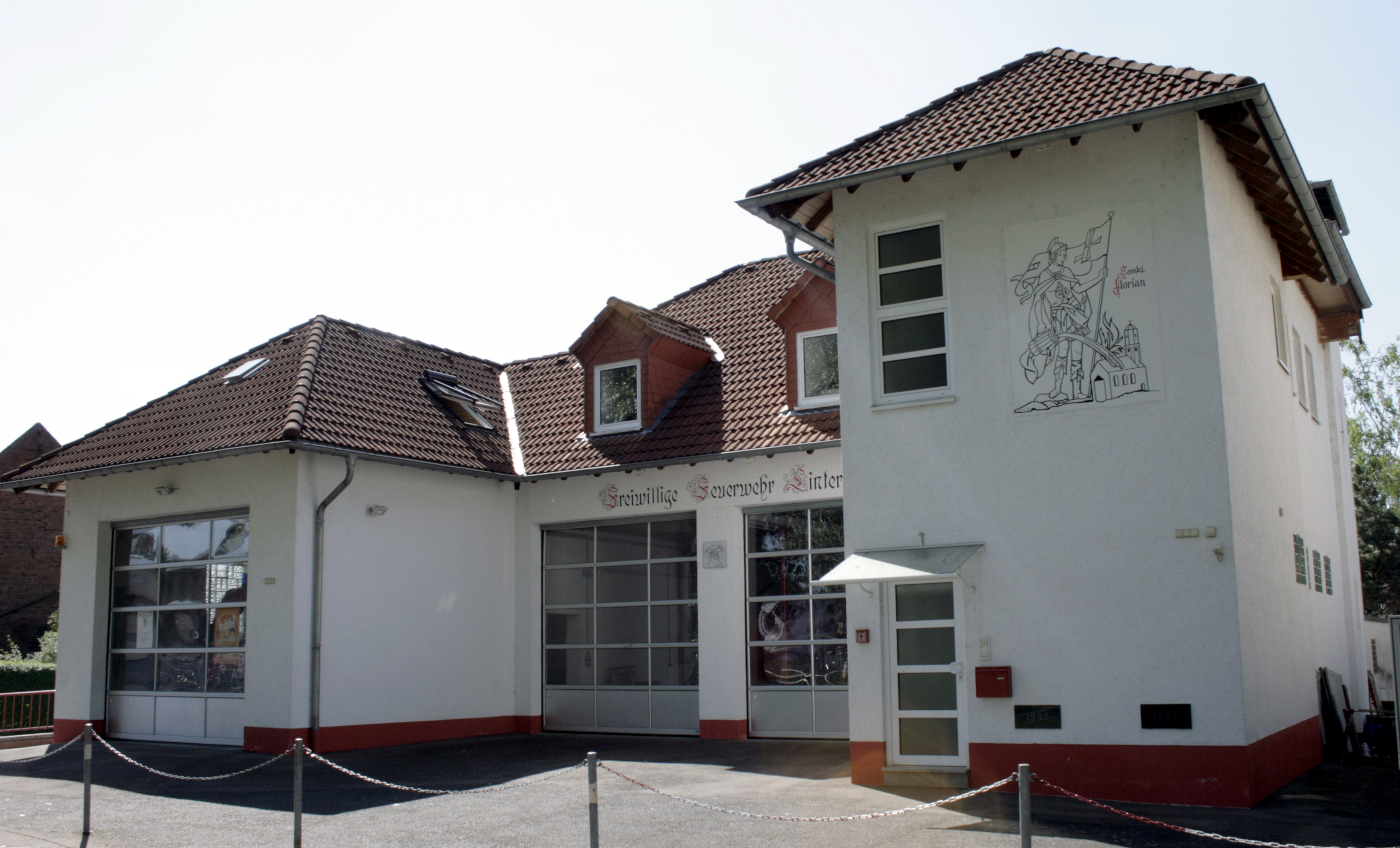 Feuerwehrhaus in Linter, Deutschland